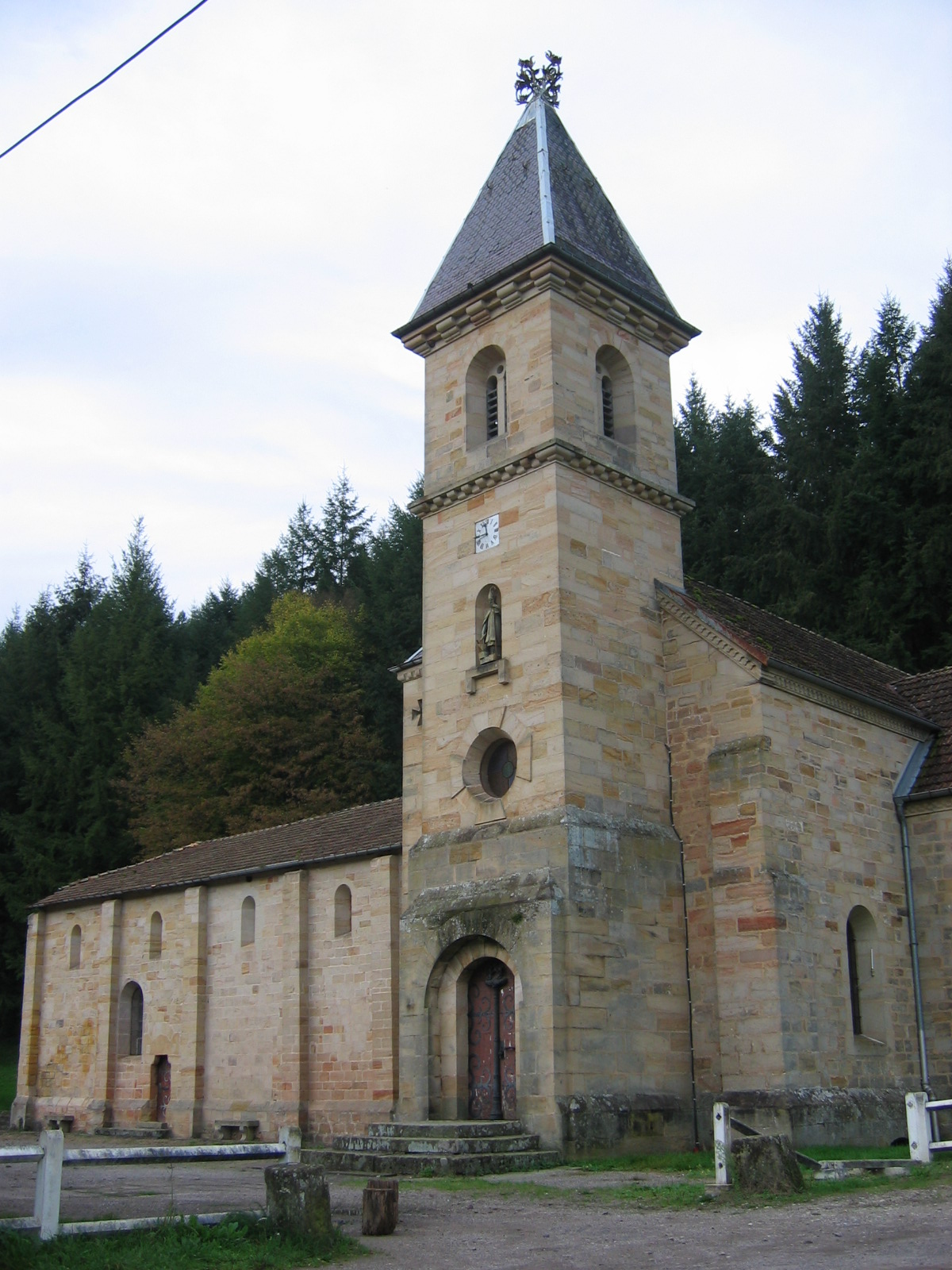 Abbaye Notre Dame de Droiteval - Claudon(88)